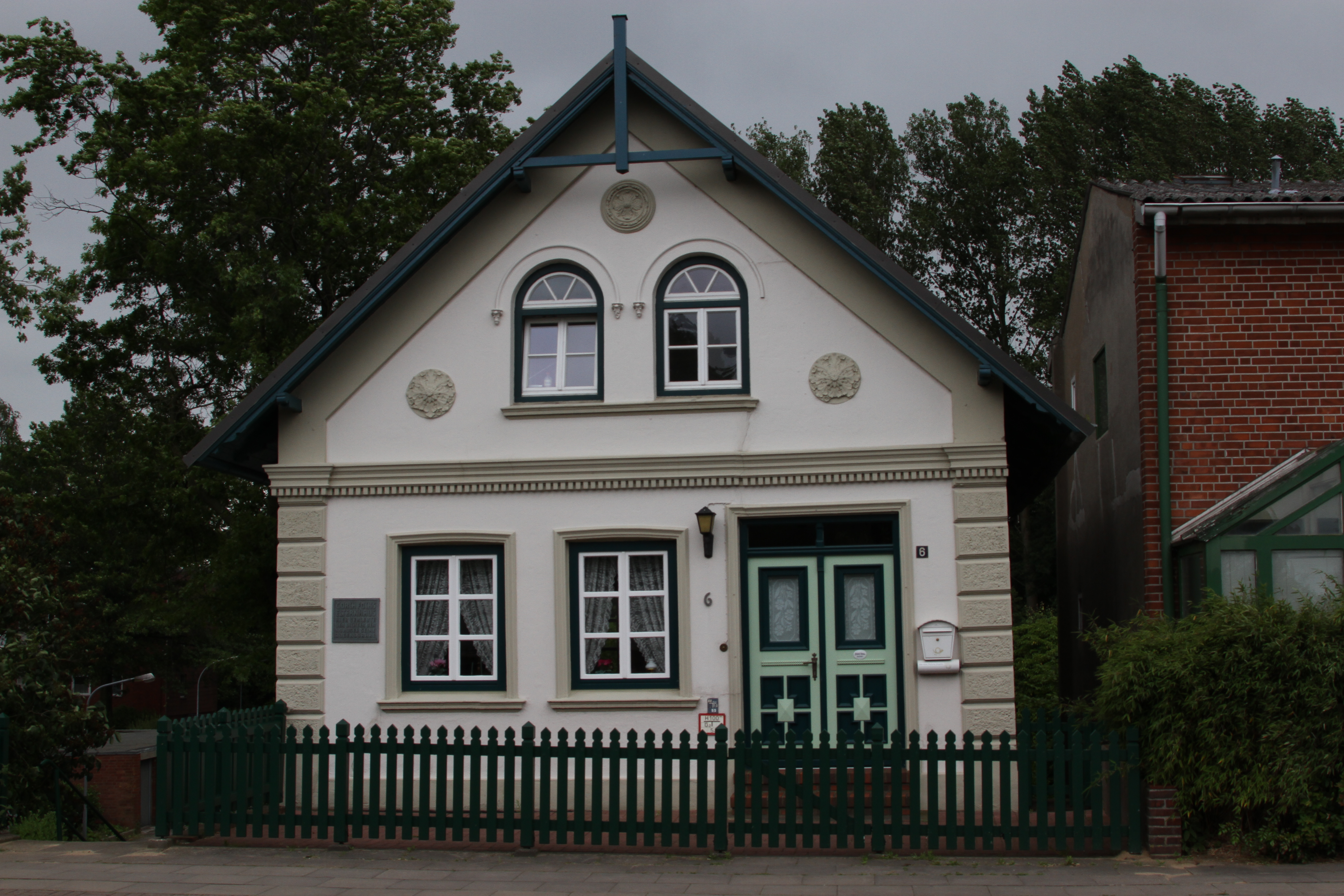 1880 errichtetes Finkenwerder Fischerhaus, seit 1892 auch Elternhaus des niederdeutschen Schriftstellers Johann Wilhelm Kinau (Künstlername Gorch Fock) und seiner Brüder. Finkenwerder.This is a photograph of an architectural monument.